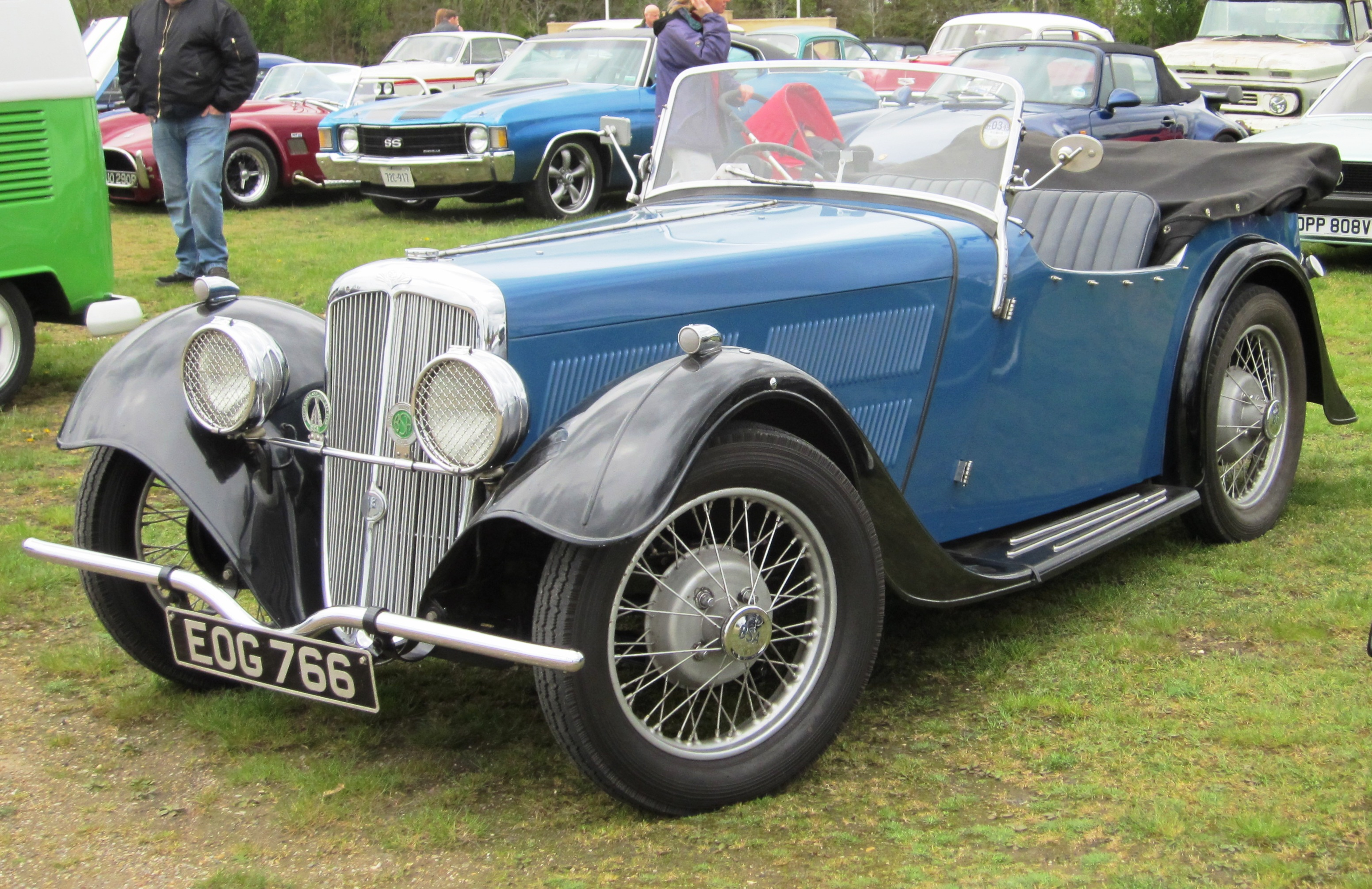 BSA Scout à Duxford